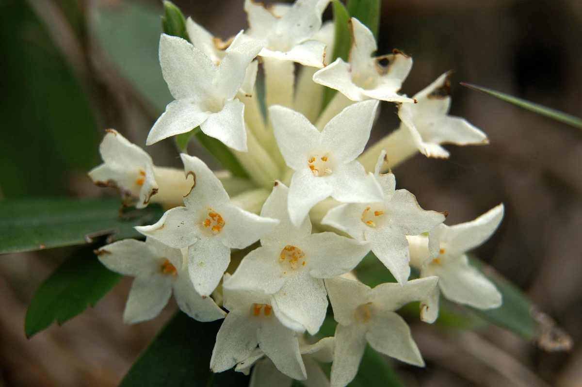 Blagajev volčin na Polhograjski Grmadi.